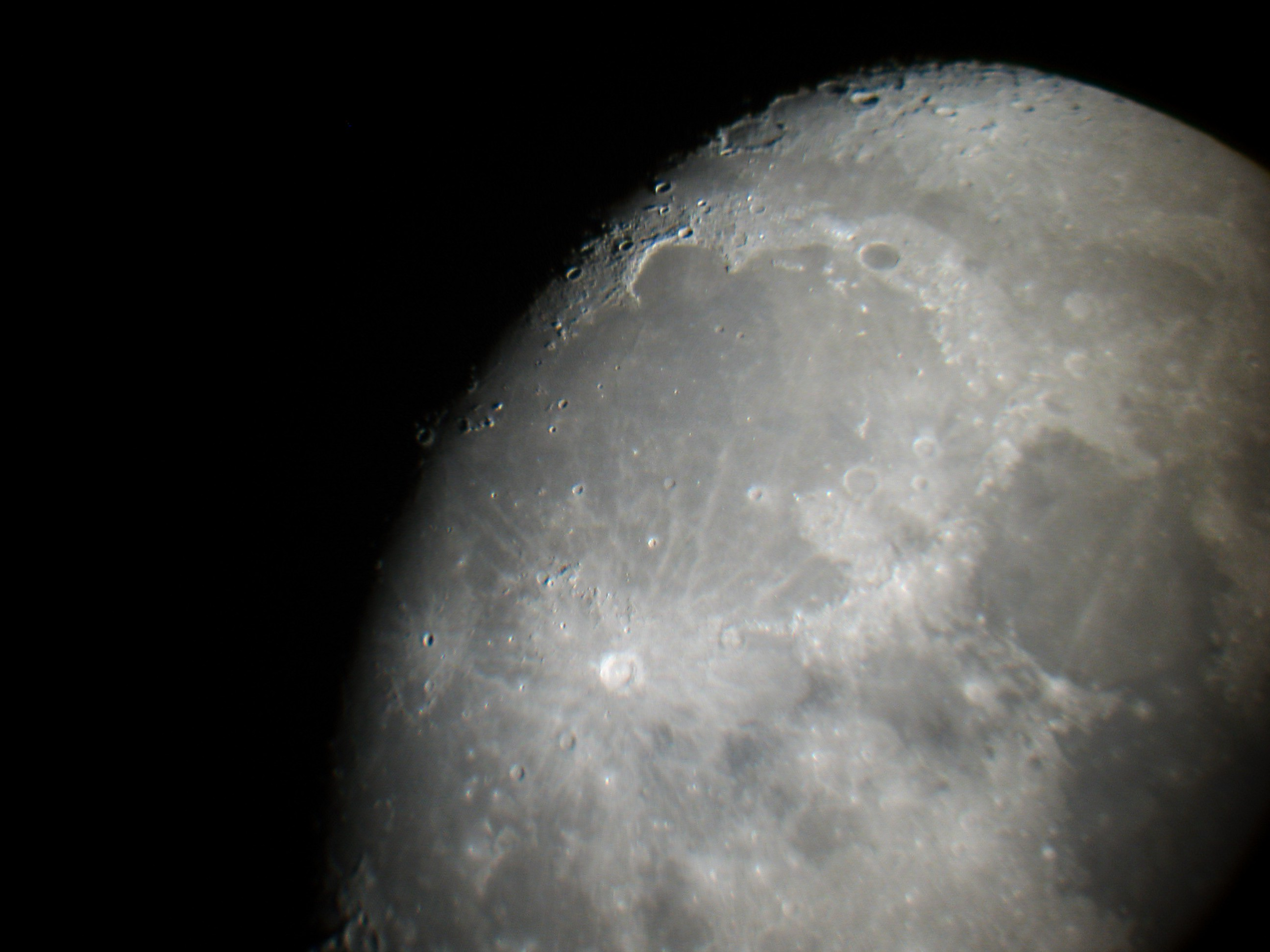 Mare Imbrium mit den Randbergen am nördlichen Kraterrand, 150 mm Spiegelteleskop bei nicht optimalen Bedingungen. Wer ein besseres Bild macht, darf das hier gerne austauschen Fotograf: Stephan Brunker